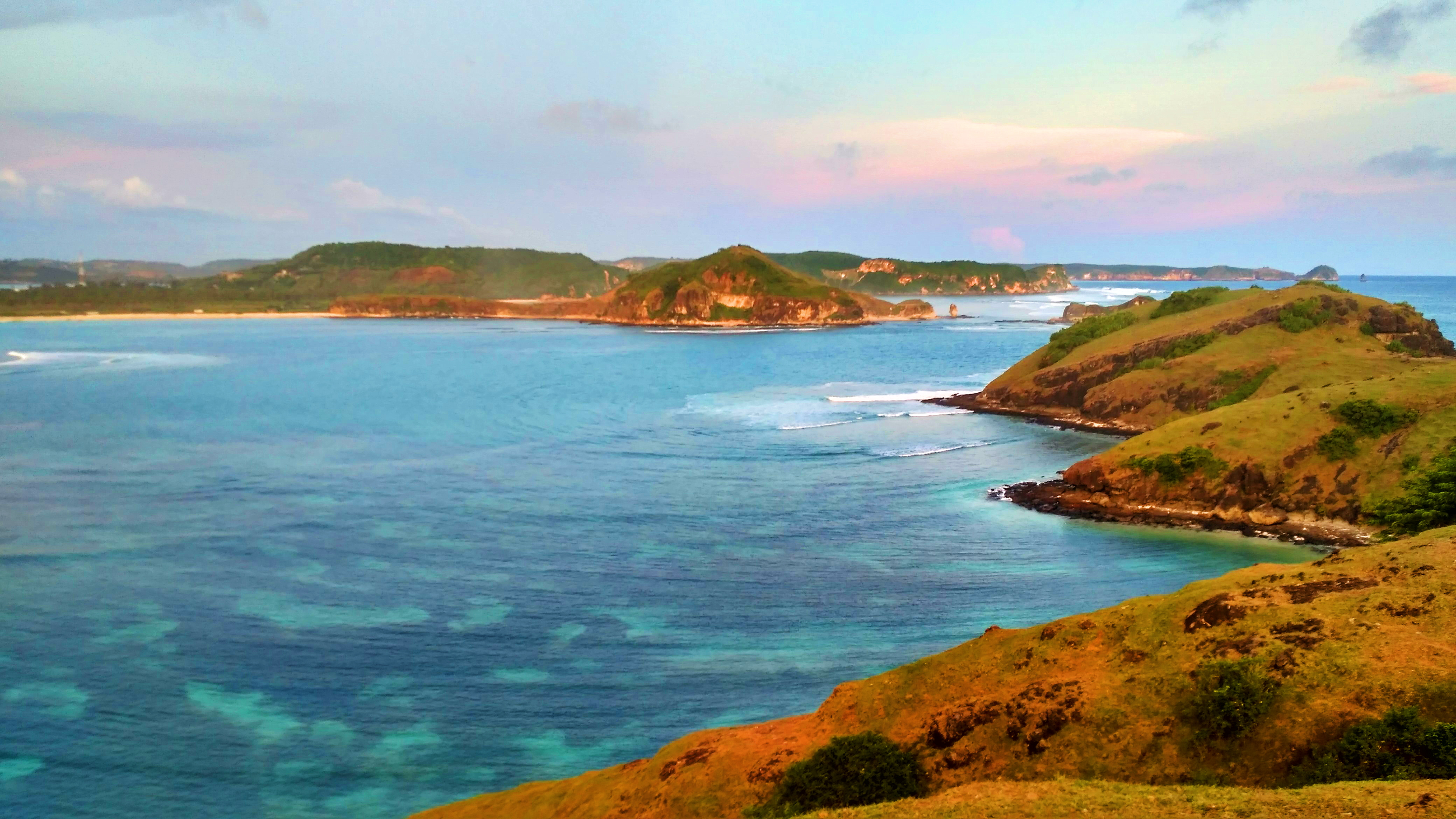 Tanjung Aan dilihat dari Bukit Merese, Lombok. Gambar diambil mendekati matahari terbenam.